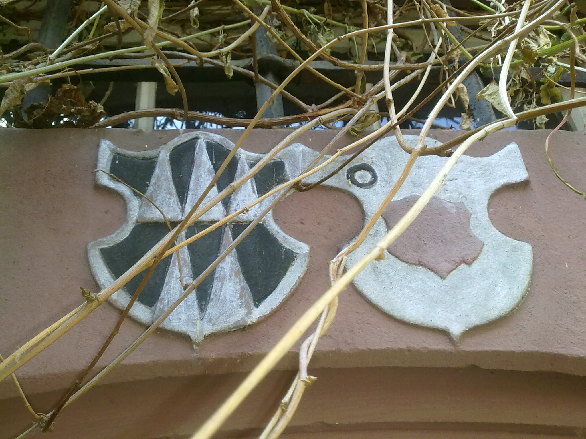 Das Doppelwappen am Portal des Hofeingangs in den Nordflügel des Wambolt'schen Schlosses in Groß-Umstadt. Neben dem Besitzerwappen der Wambolt von Umstadt heraldisch links das Allianzwappen der Ministerialien Knebel von Katzenelnbogen